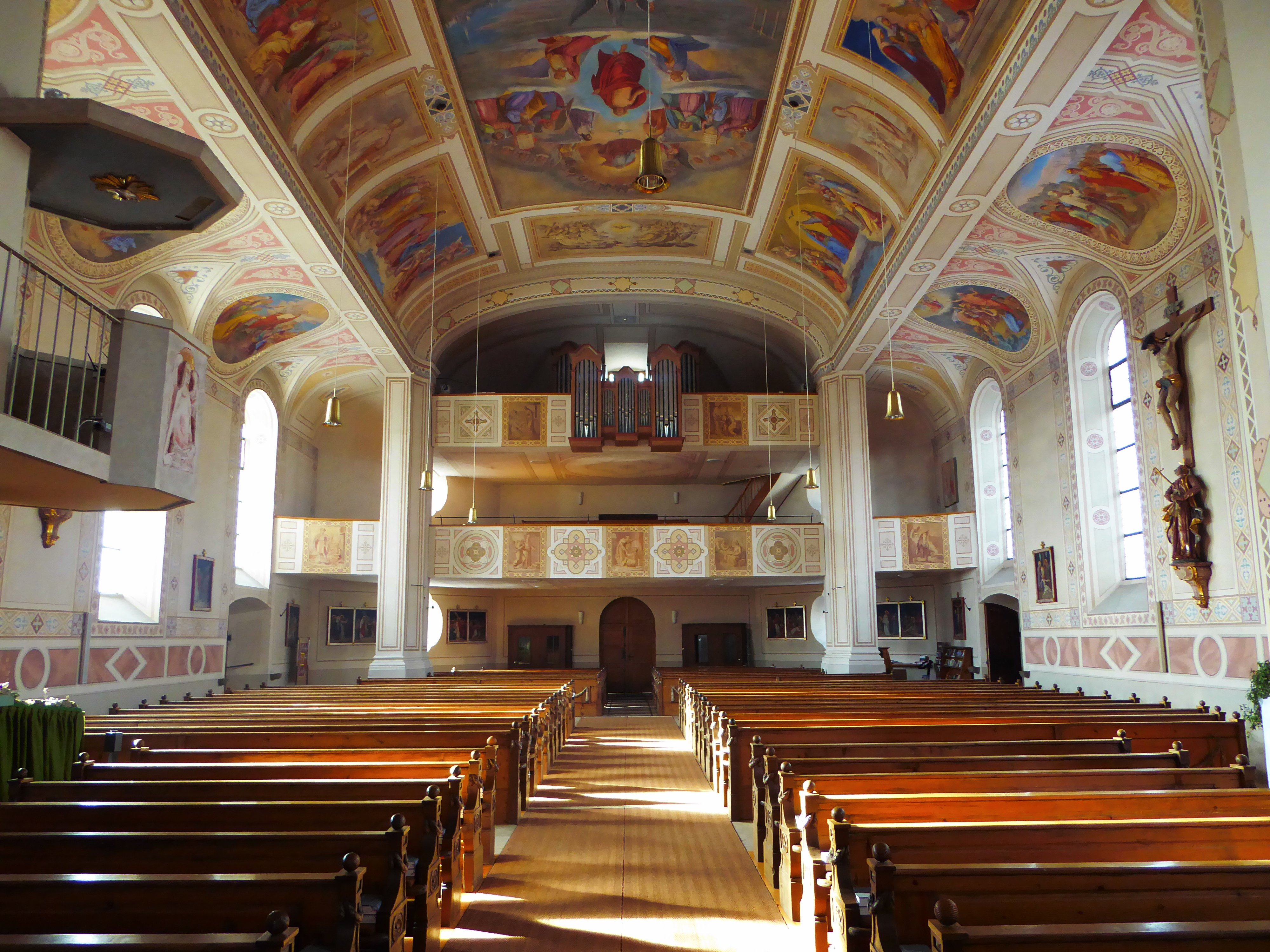 87463 Dietmannsried, Germany